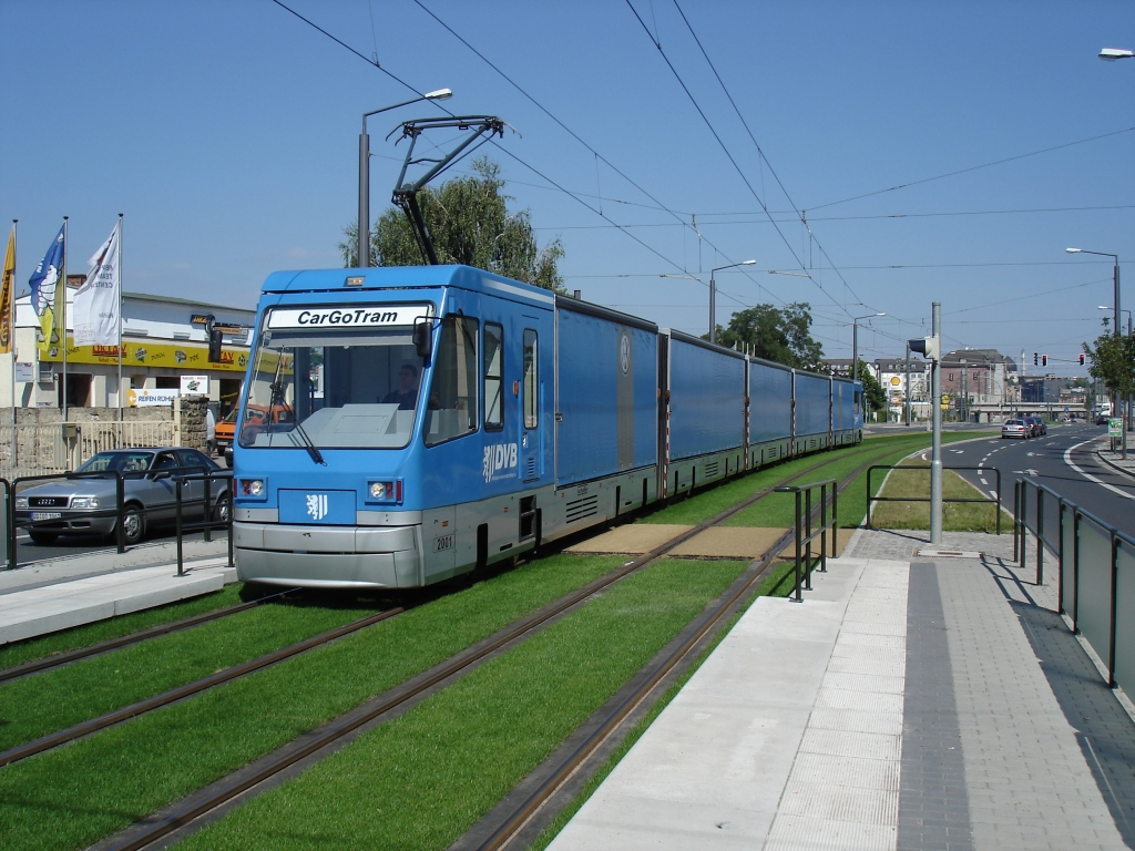 CarGoTram auf der Löbtauer Straße in Dresden